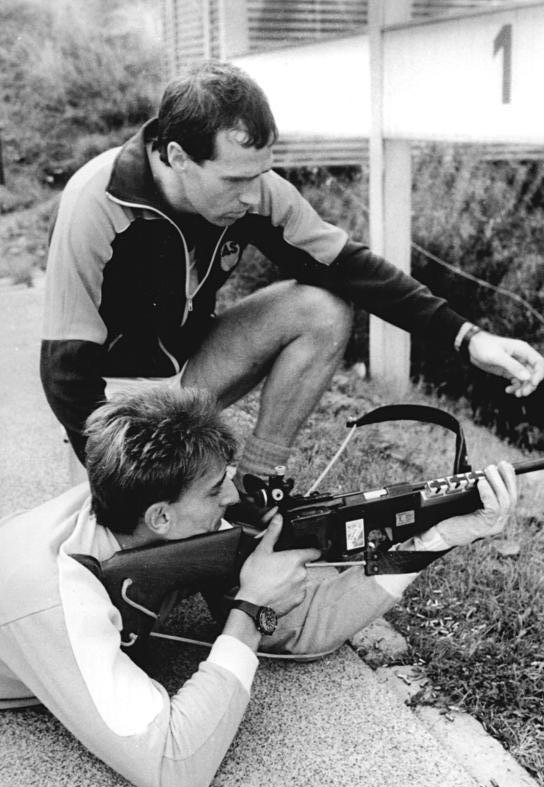 Frank Luck, Frank Ullrich ADN-ZB Schaar 3.10.89 Bez. Suhl: Weggefährten-Ullrich-Frank Ullrich, hier beim Schießtraining mit dem amtierenden Biathlon-Weltmeister über die 10 Kilometer Distanz, Frank Luck, gehört zu den populärsten Sportlern der 40jährigen DDR-Sportgeschichte. Der mehrfache Biathlon-Weltmeister und Olympiasieger ist heute Trainer beim ASK Vorwärts Oberhof und will gemeinsam mit seinen Schützlingen den guten Ruf der DDR als Biathlon-Nation verteidigen. Siehe ADN-Meldung vom 4.10.89 und Motiv 1989-1003-18N